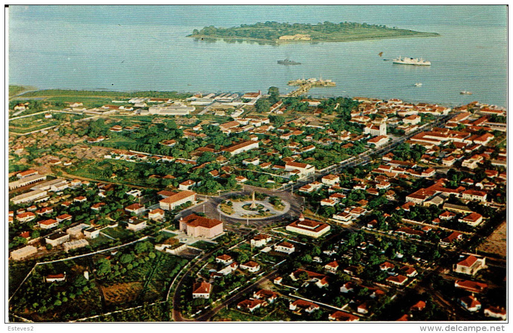 Postcard: Foto Serra No 142 - Vista aérea parcial e Ilhéu do Rei - Bissau